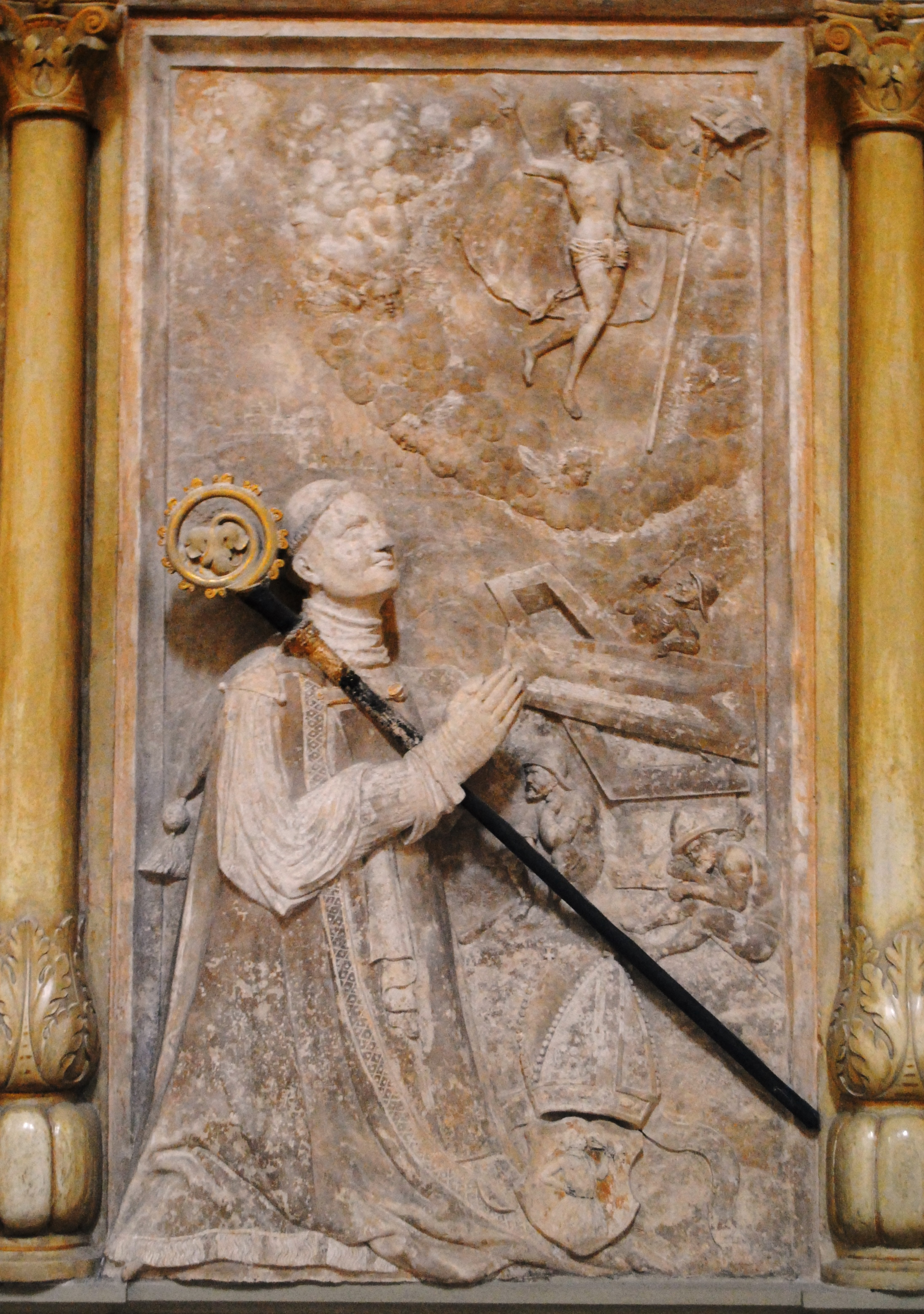 Epitaph des Abtes Conrad Hartmann des Klosters Ebrach, Amtszeit 1543-1552